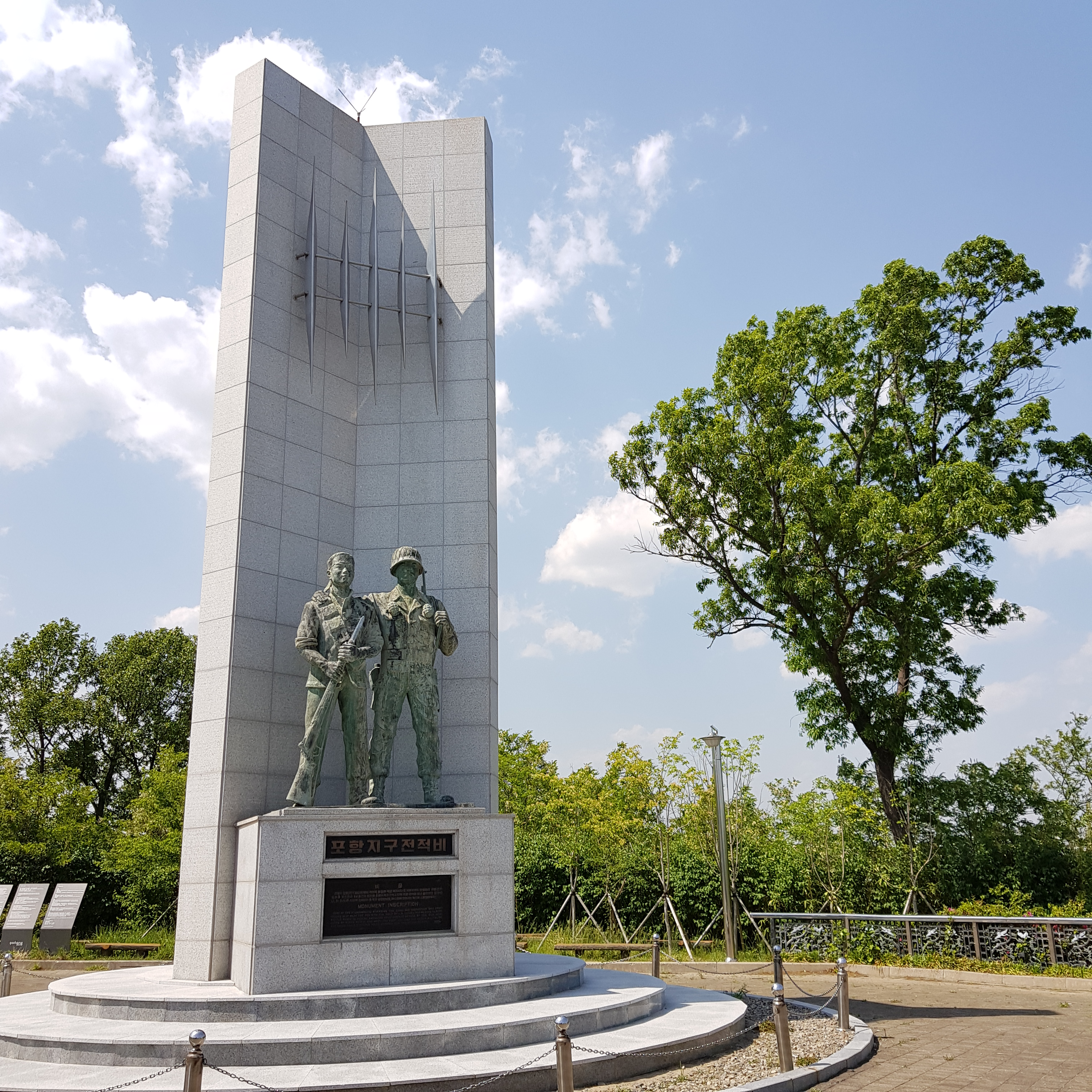 6.25 포항지구 전적비